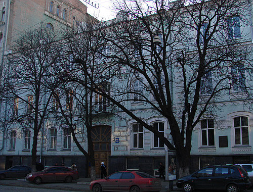 Будинок у м. Києві, Володимирська, 34/9, літера Б, де колись був розташований головний офіс НАК "Надра України"